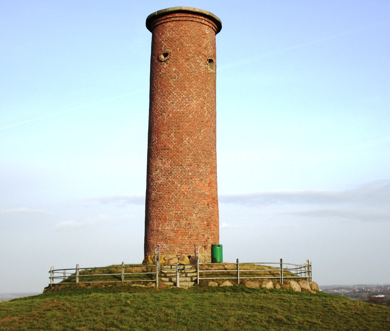 Der Goemnitzer Turm